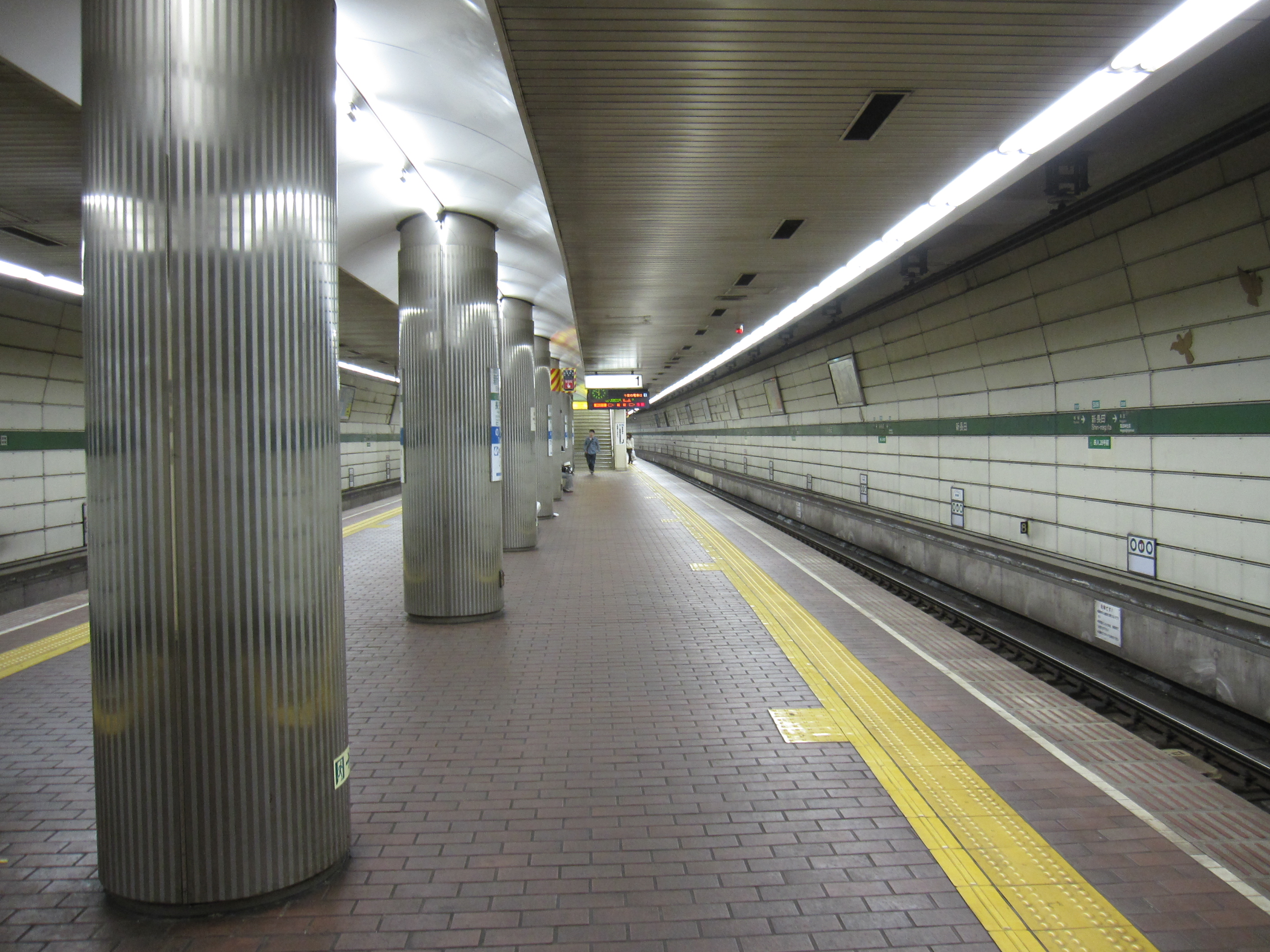 神戸市営地下鉄新長田駅